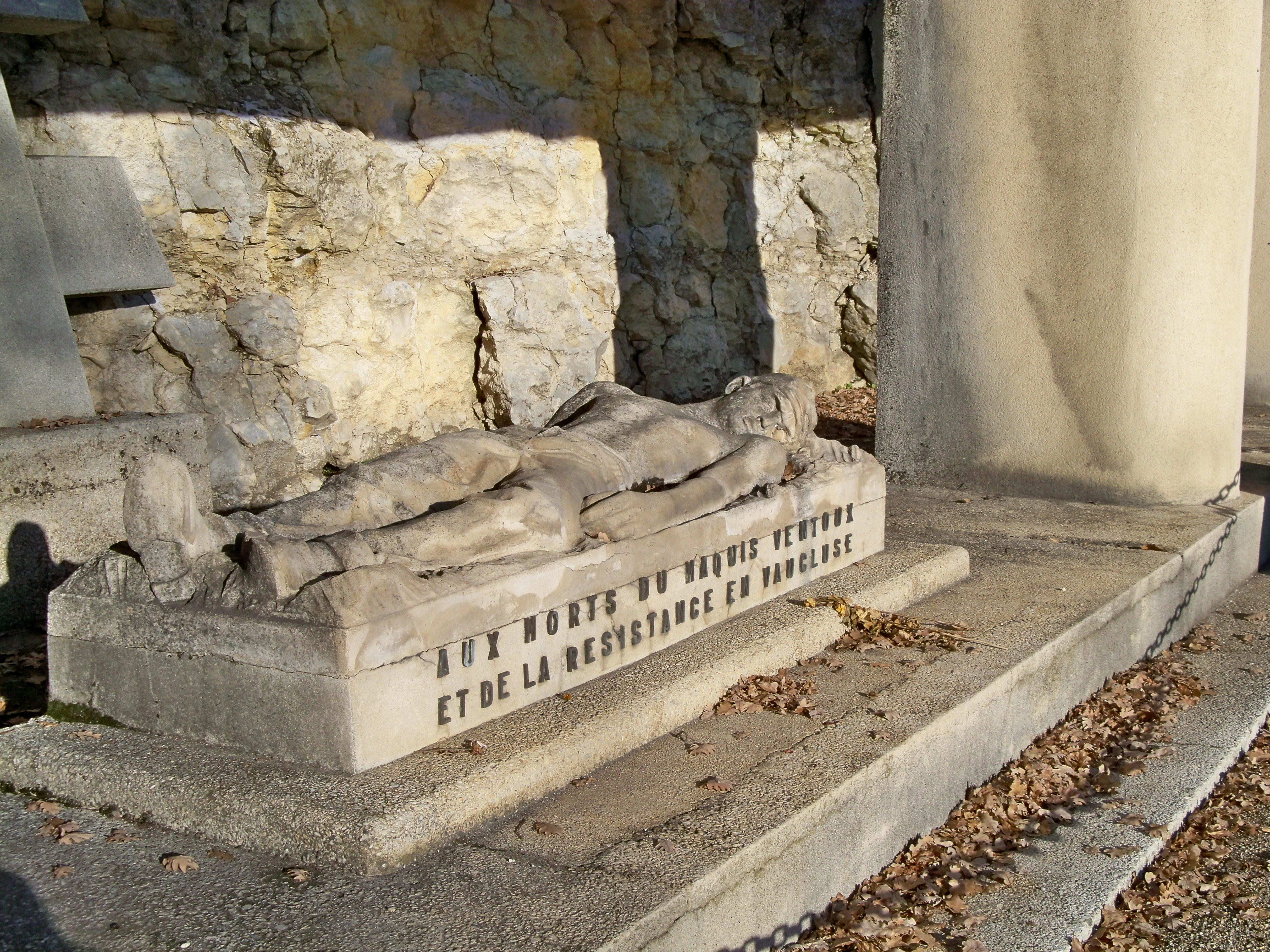 Gisant du mémorial Maquis Ventoux à Sault (Vaucluse, France)